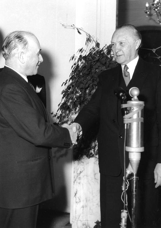 In seiner Eigenschaft als Präsident der Hohen Behörde der Montan-Union machte Jean Monnet (li.) am 9. Dezember 1953 seinen Antrittsbesuch bei Bundeskanzler Dr. Konrad Adenauer (re.) in Bonn.